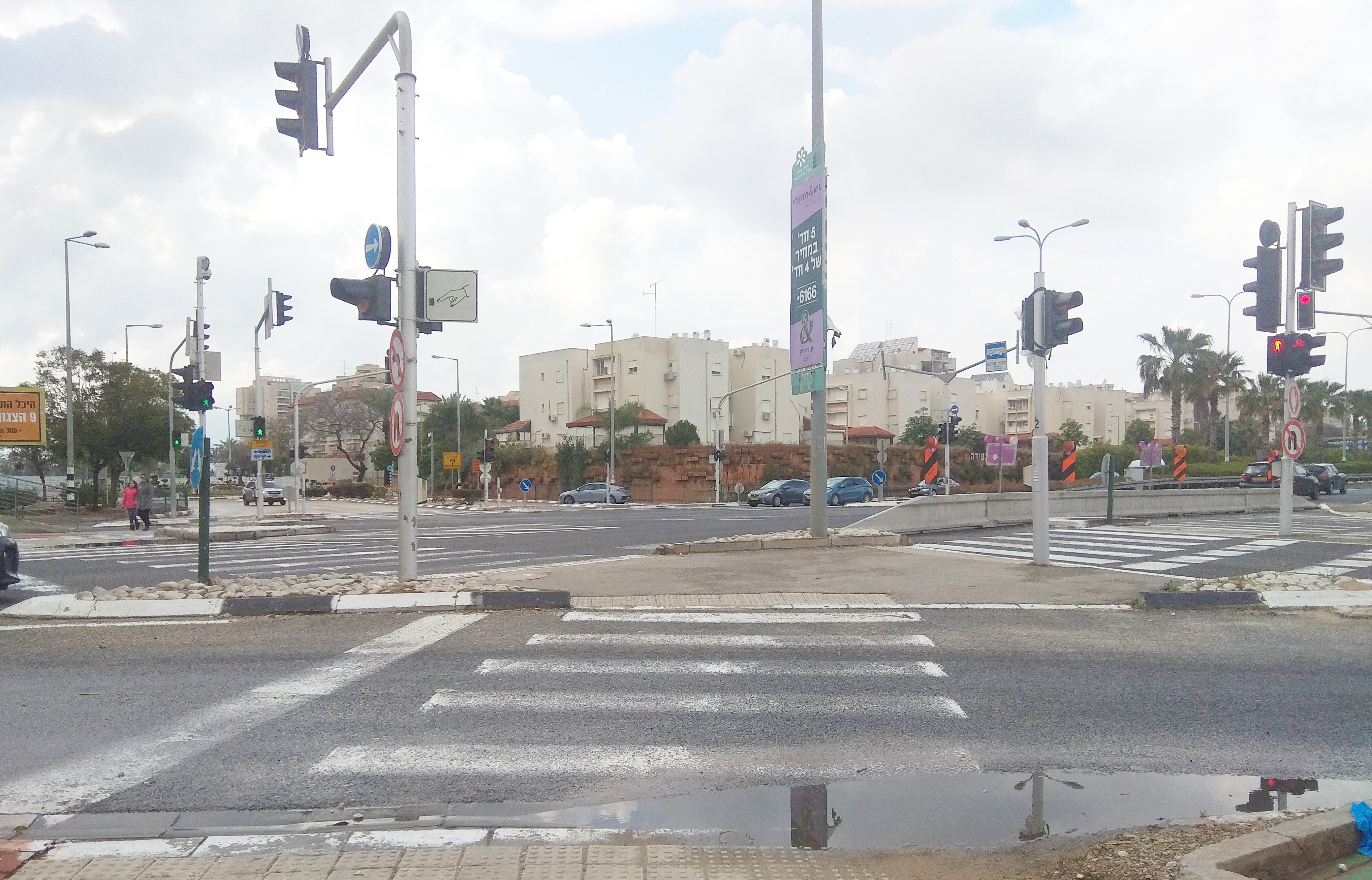 צומת עין אפק